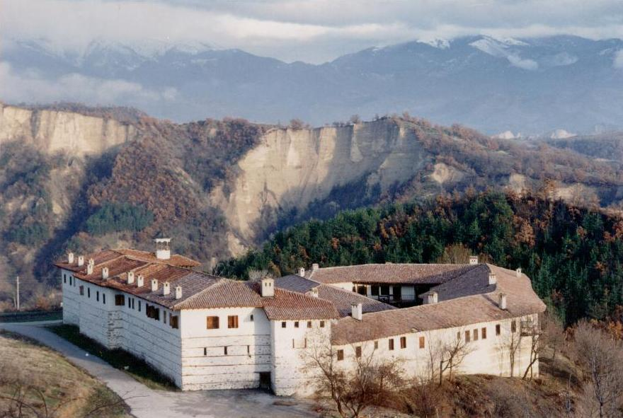 Bulgarien: Roschen-Kloster an der grieschichen Grenze, 1996. Foto: R.P. Braun